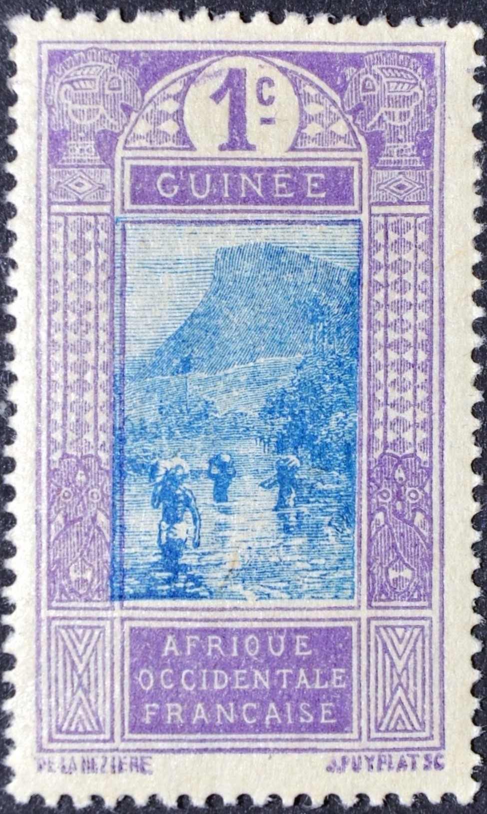 Stamp of French Guinea, 1c, 1913